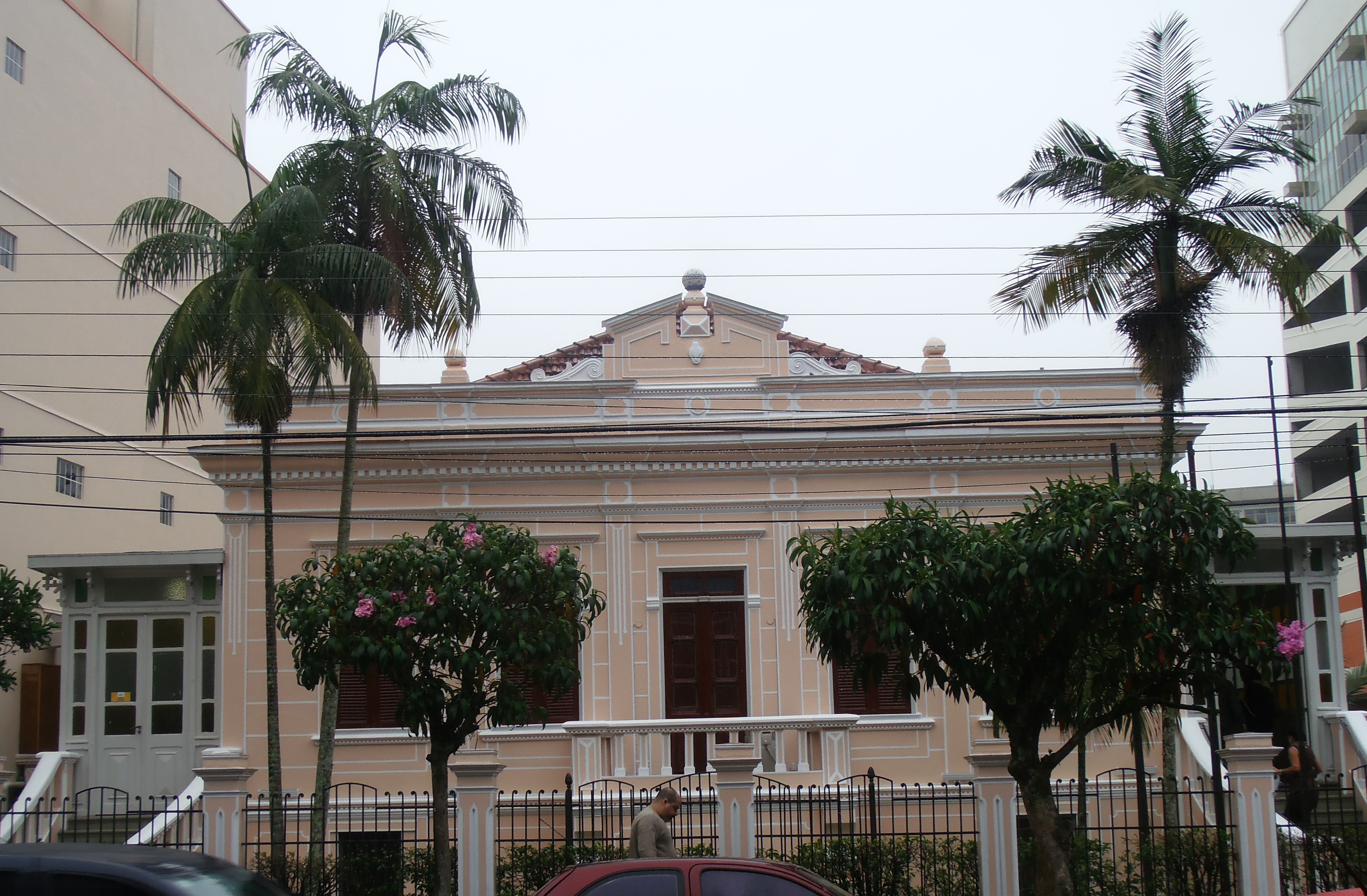 Fachada principal do Palacete Granado, localizado no centro de Teresópolis, atual sede do SESC. Todos os direitos reservados à Josué Marinho.